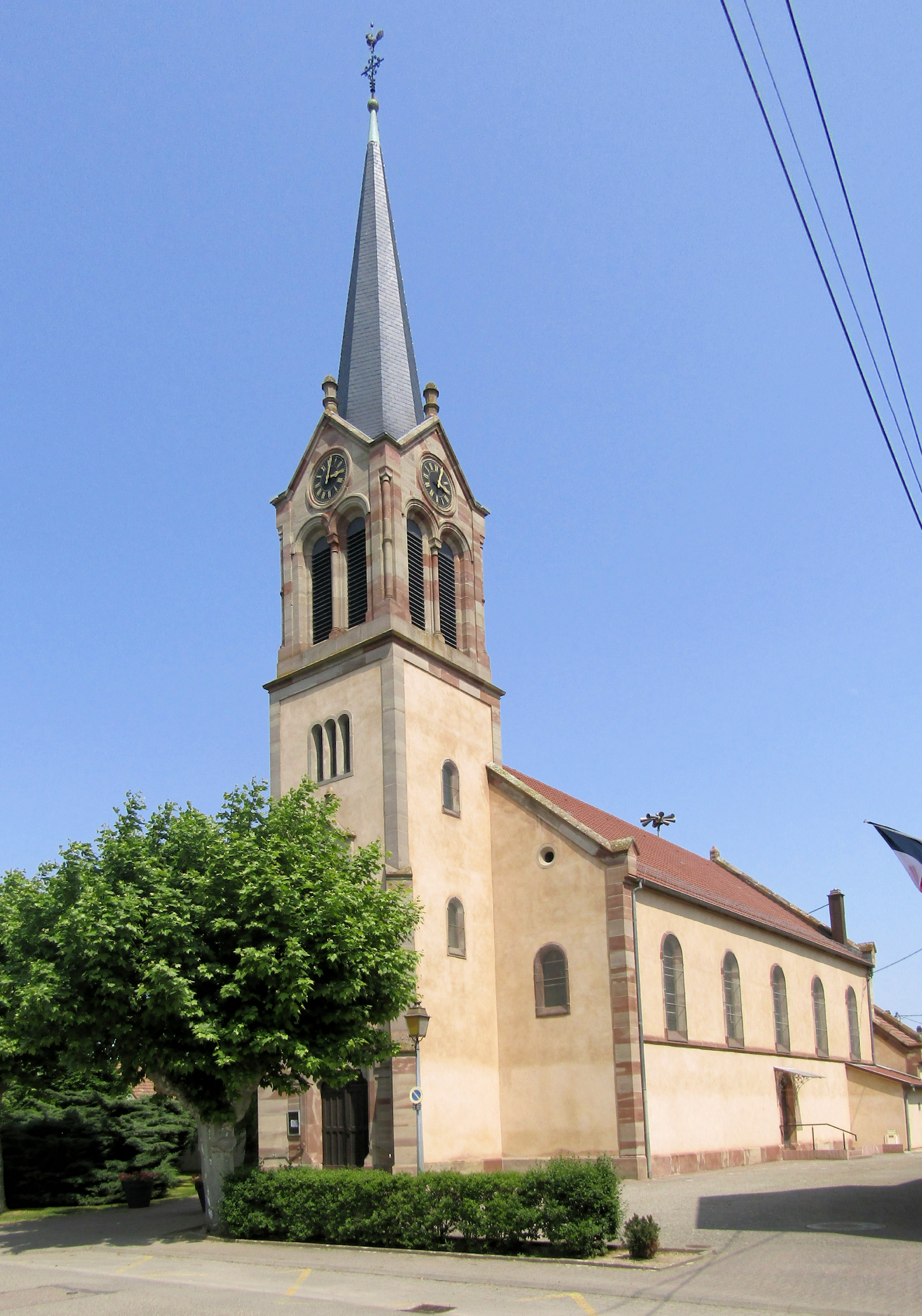 L'église Saint-Martin à Bolsenheim